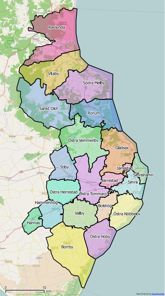 Distriktsindelningen i kommunen. World file: 74.81311866236652008 0 0 -74.81311866236652008 1560938.79159522382542491 7514088.18356645572930574